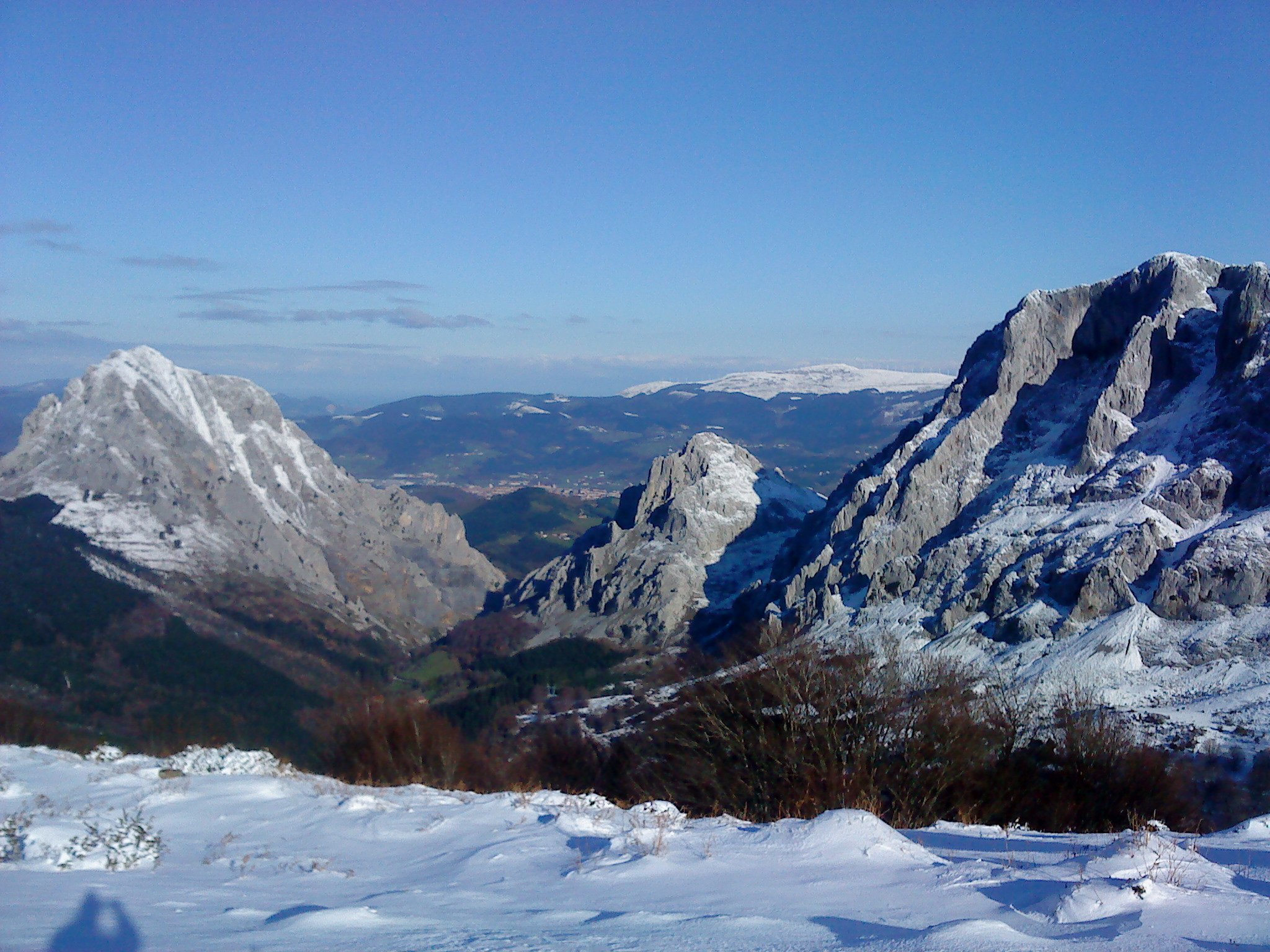 Monte Untzillaitz, Aitz Txiki y Alluitz en el Parque Natural de Urkiola, Bizkaia País vasco (España).